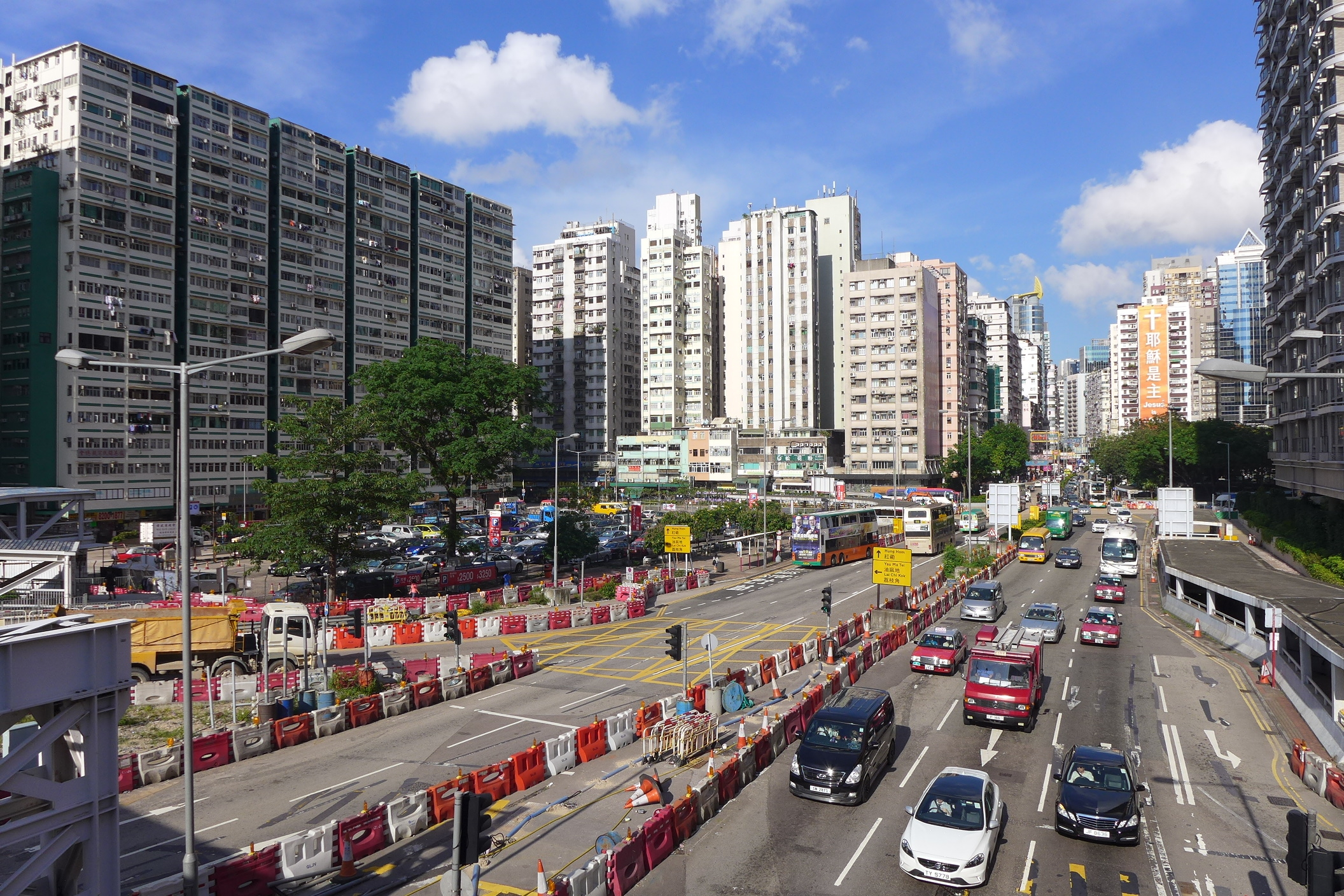 Jordan View